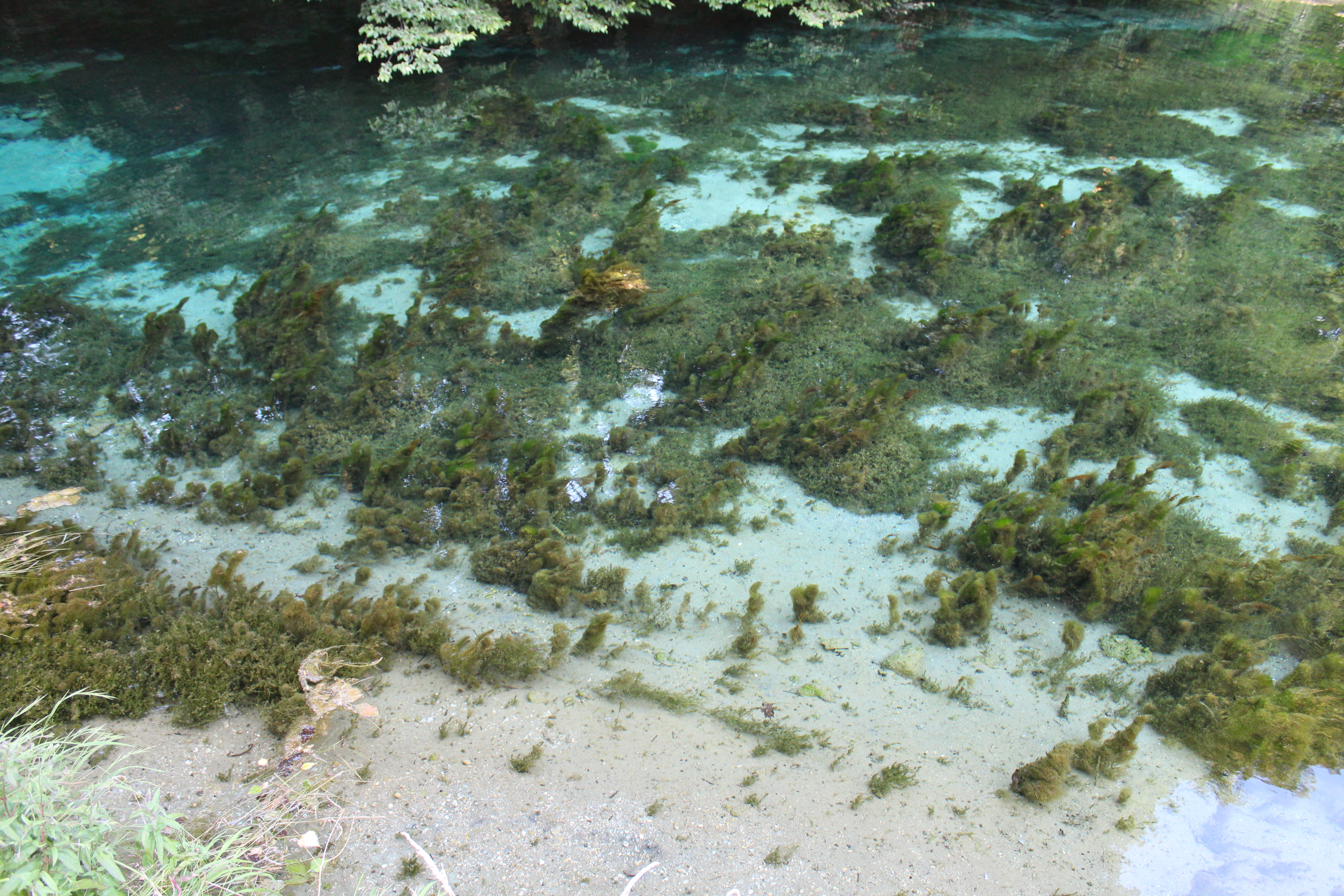 Blaue Quelle, Blauer Gumpen sowie die umgebende Baumgruppe - Quellensee This media shows the natural monument in the Tyrol with the ID ND_5_1.